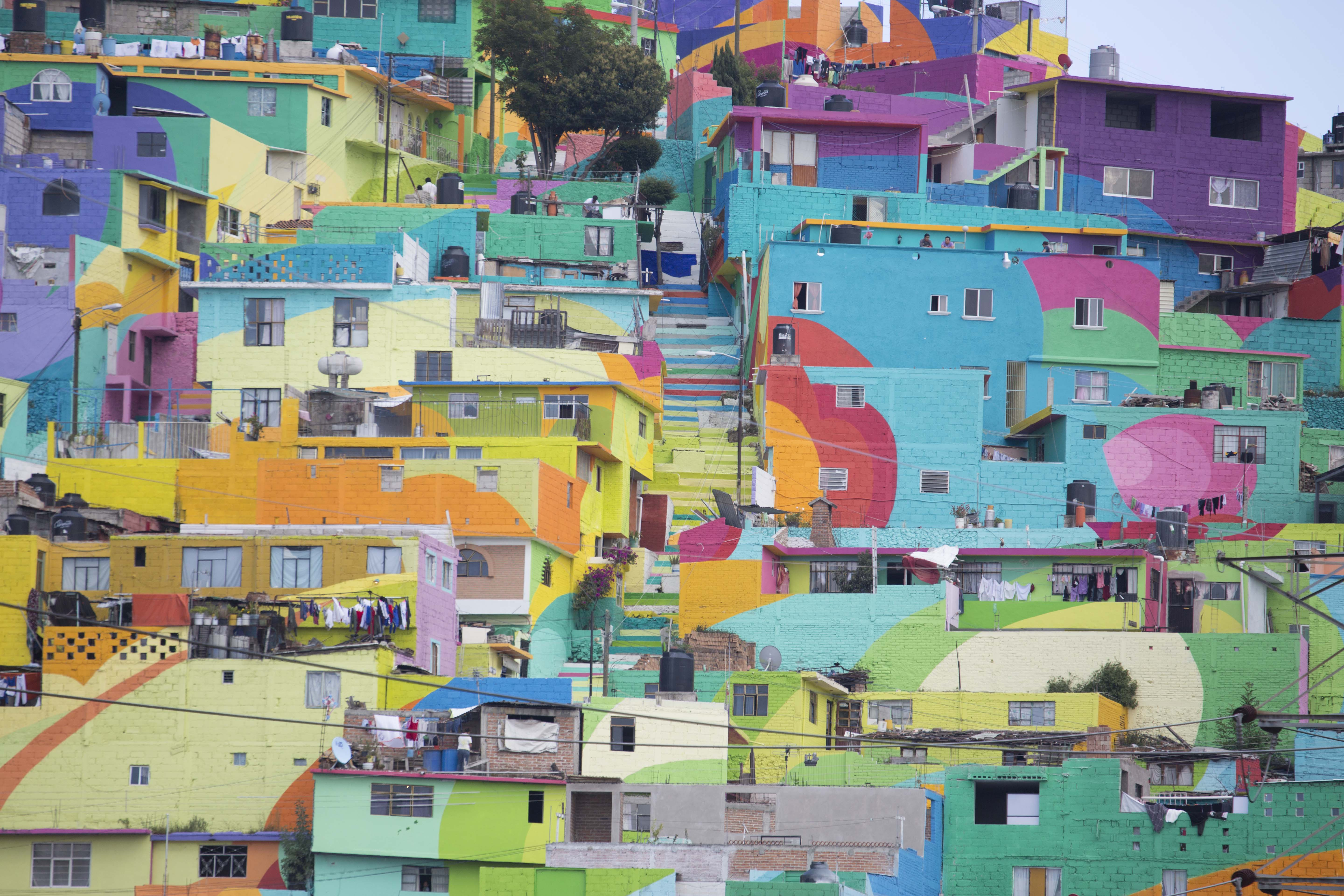 Inauguración del Macromural “Pachuca se Pinta”. Pachuca, Hidalgo. 31 de agosto de 2015.